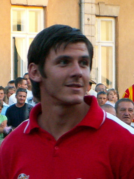 Łukasz Załuska - Korona Kielce player